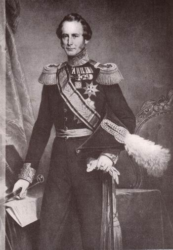 Wilhelm Friedrich Karl von Oranien-Nassau (* 28. Februar 1797 in Berlin; † 8. September 1881 in Wassenaar). Fotografie um 1860.